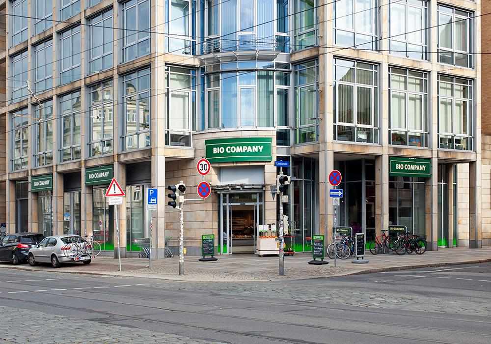 Biocompany laden